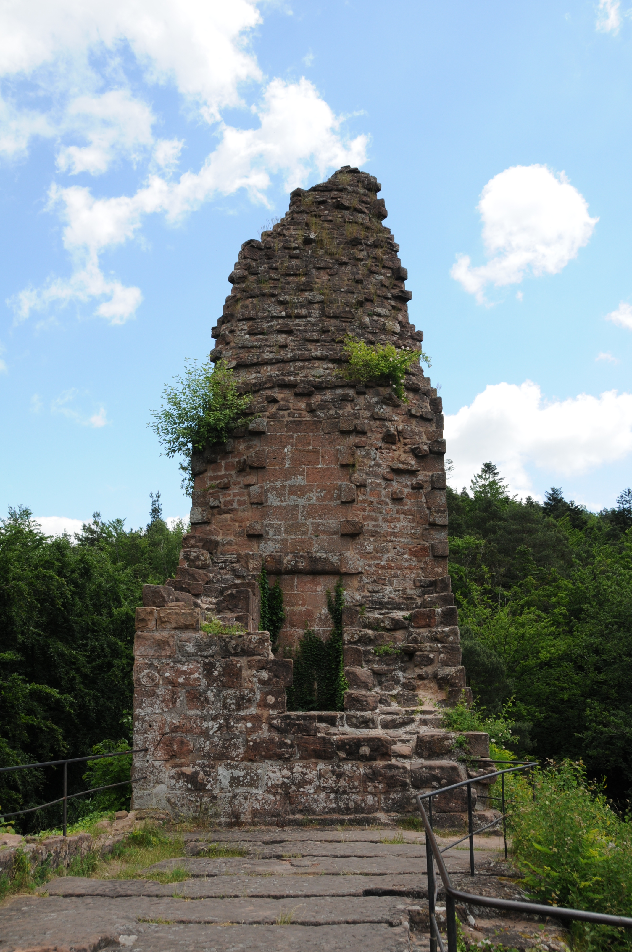 Ruine des Bergfrieds der Burg Groß Wasigenstein